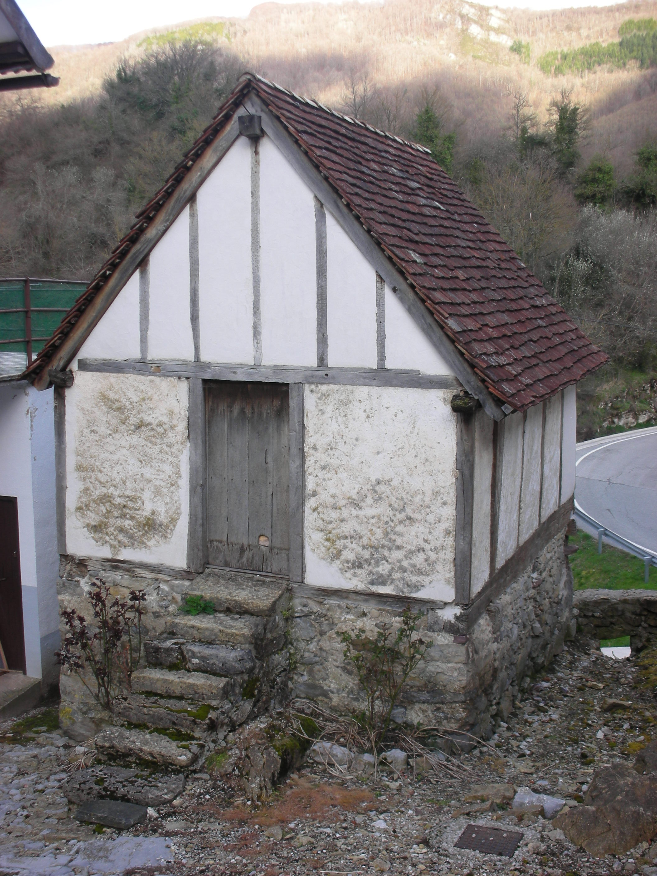 Hórreo Jabat en Orbara (Navarra)